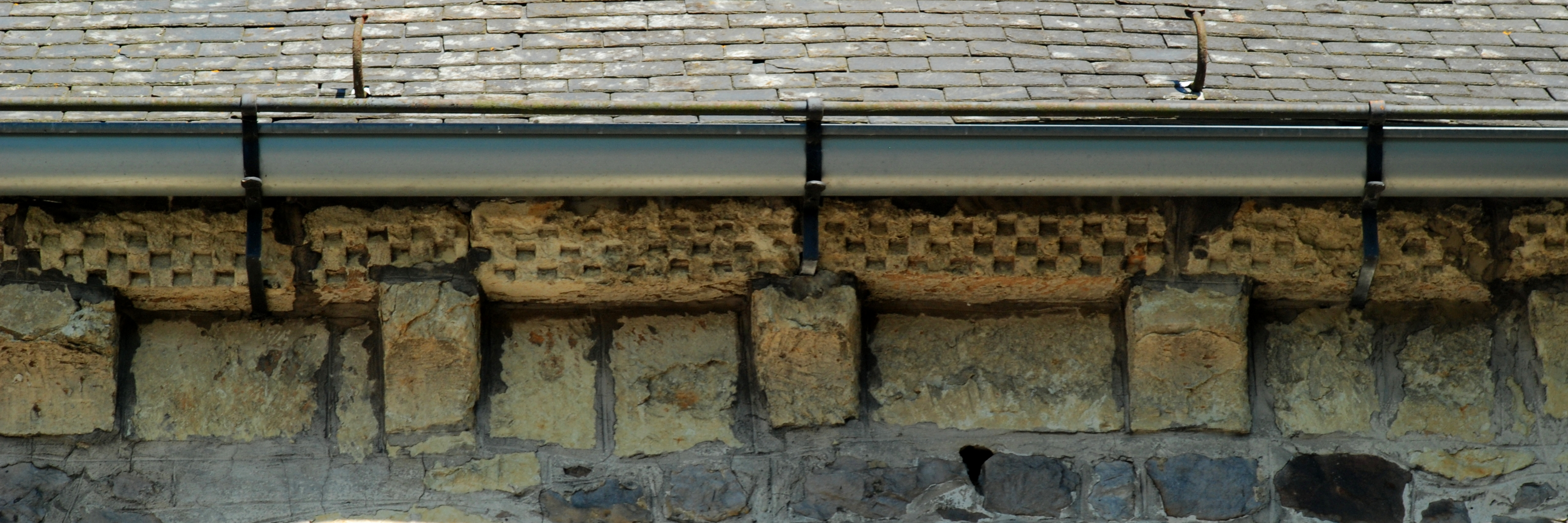 Belgique - Brabant wallon - Hélécine - Neerheylissem - Eglise Saint-Sulpice